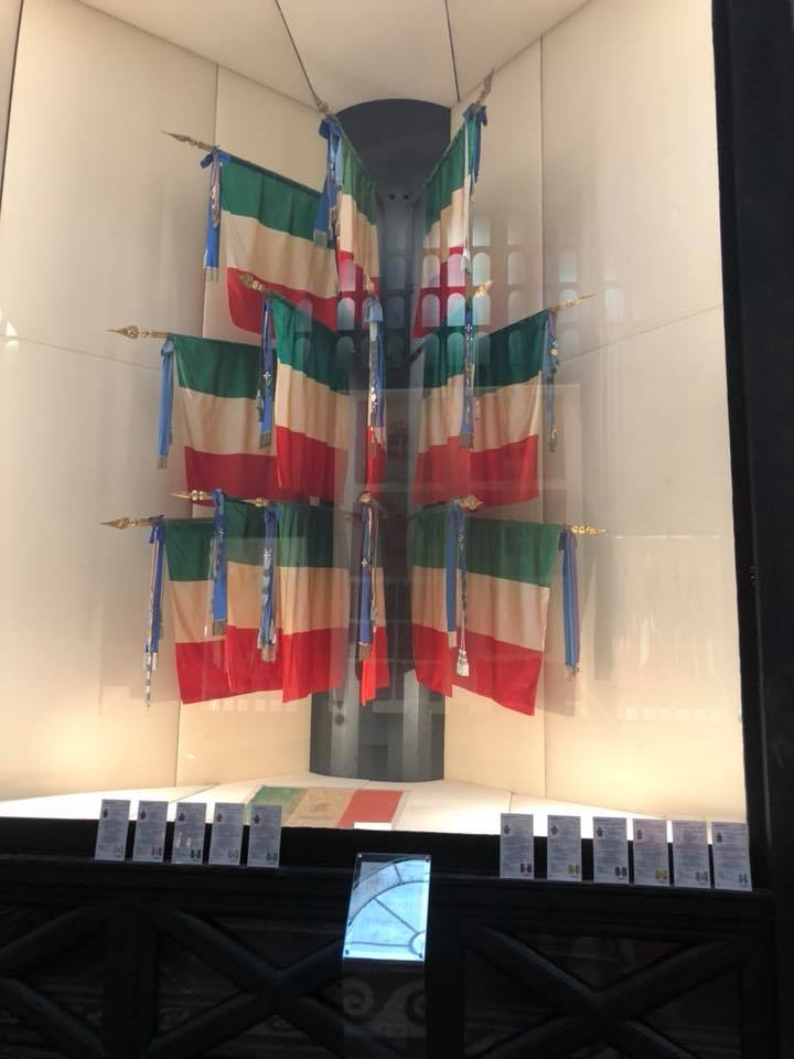 Sacrario delle bandiere Al Vittoriano Roma